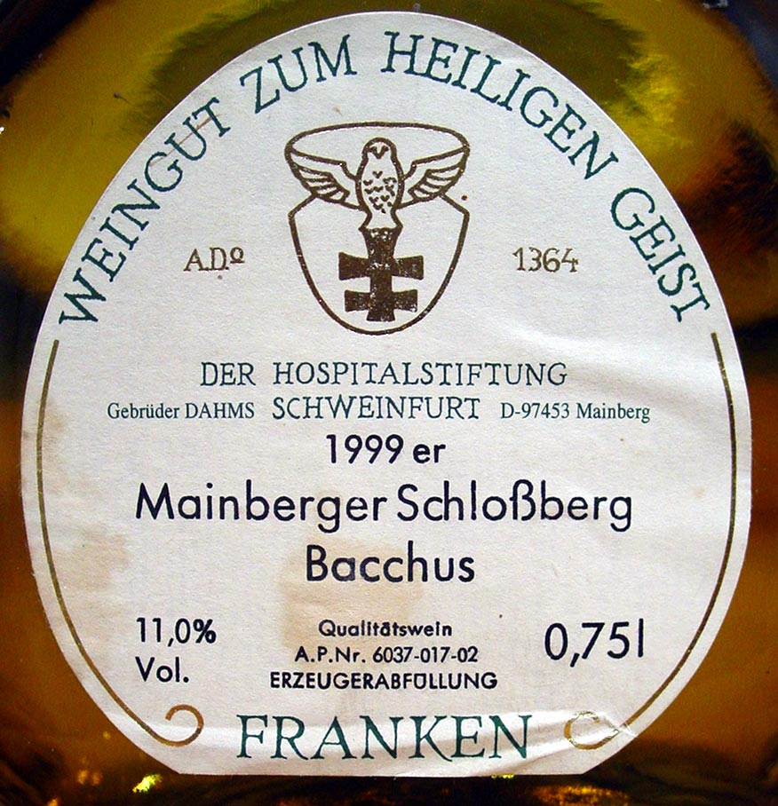 Weinetikett Fränkischer Bocksbeutel, Mainberger Schloßberg 1999